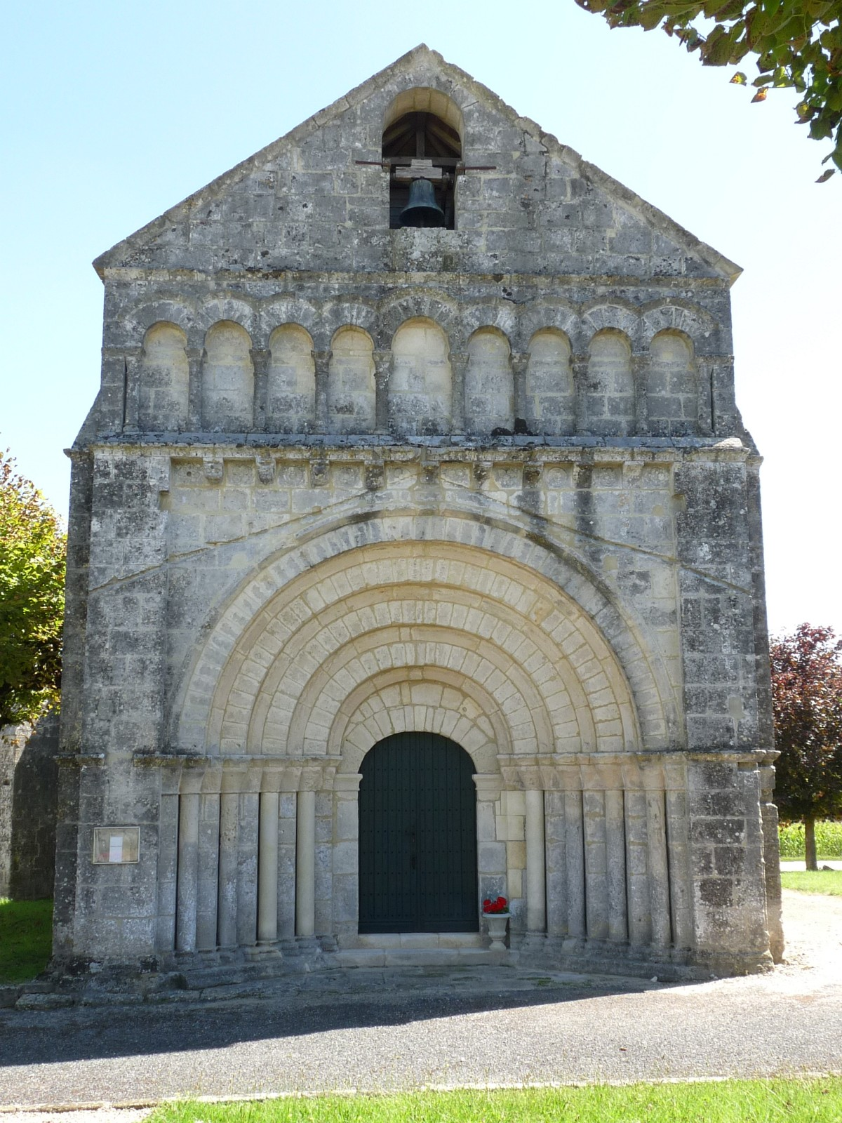 Eglise de Neulles, Charente-Maritime, France